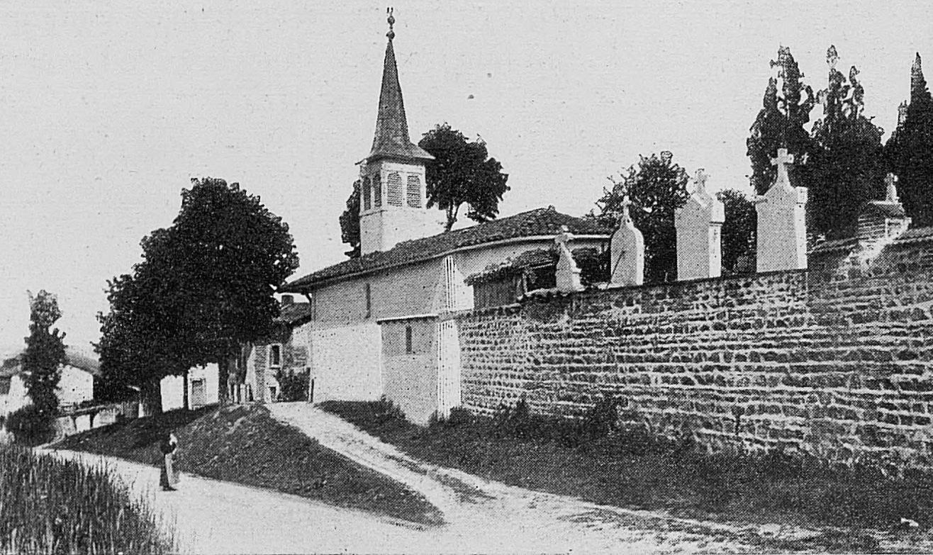 Dictionnaire illustré des communes du département du Rhône. Tome 1 / par MM. E. de Rolland et D. Clouzet.